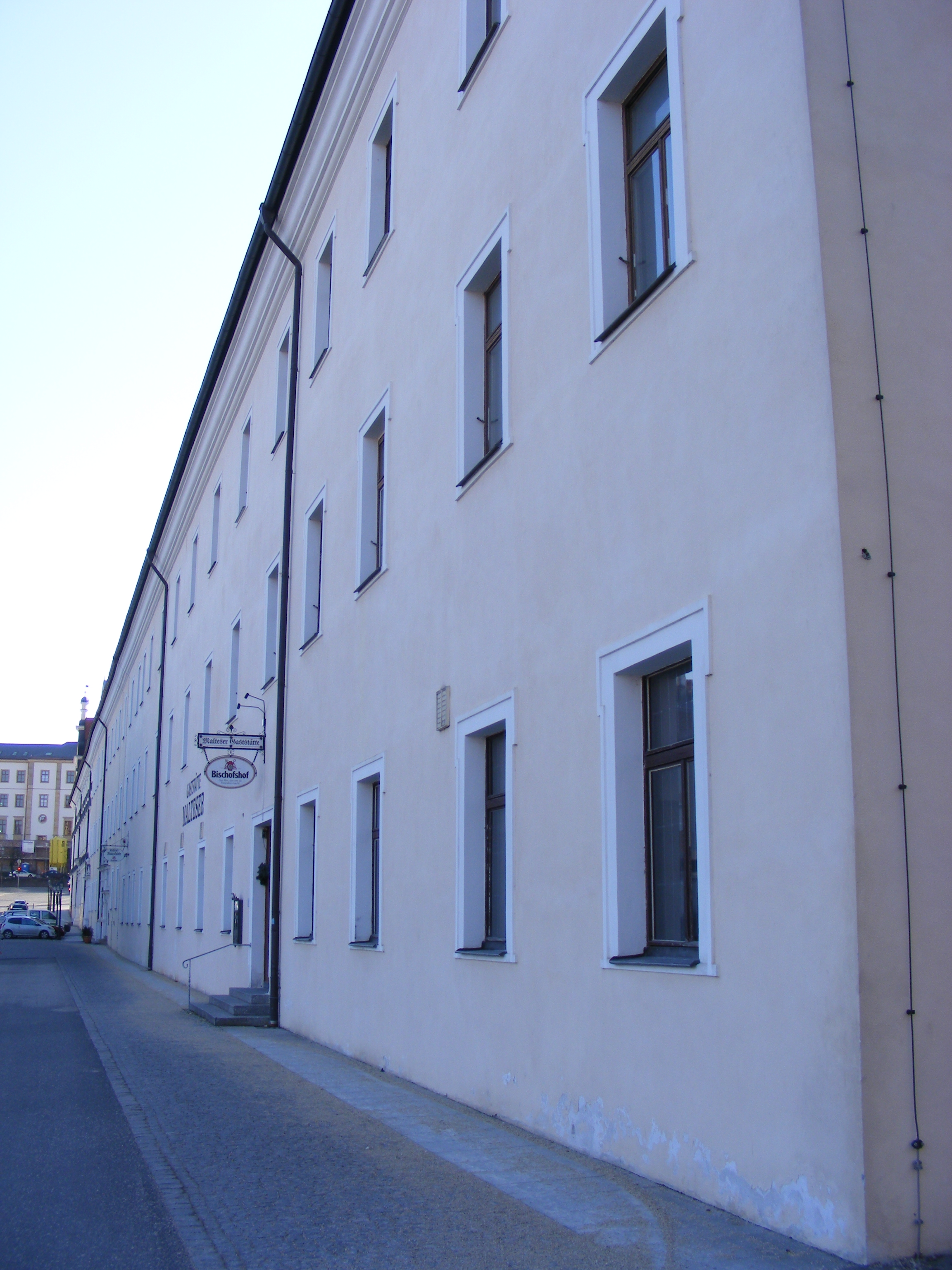 Amberg - Maltesergebäude u.a.